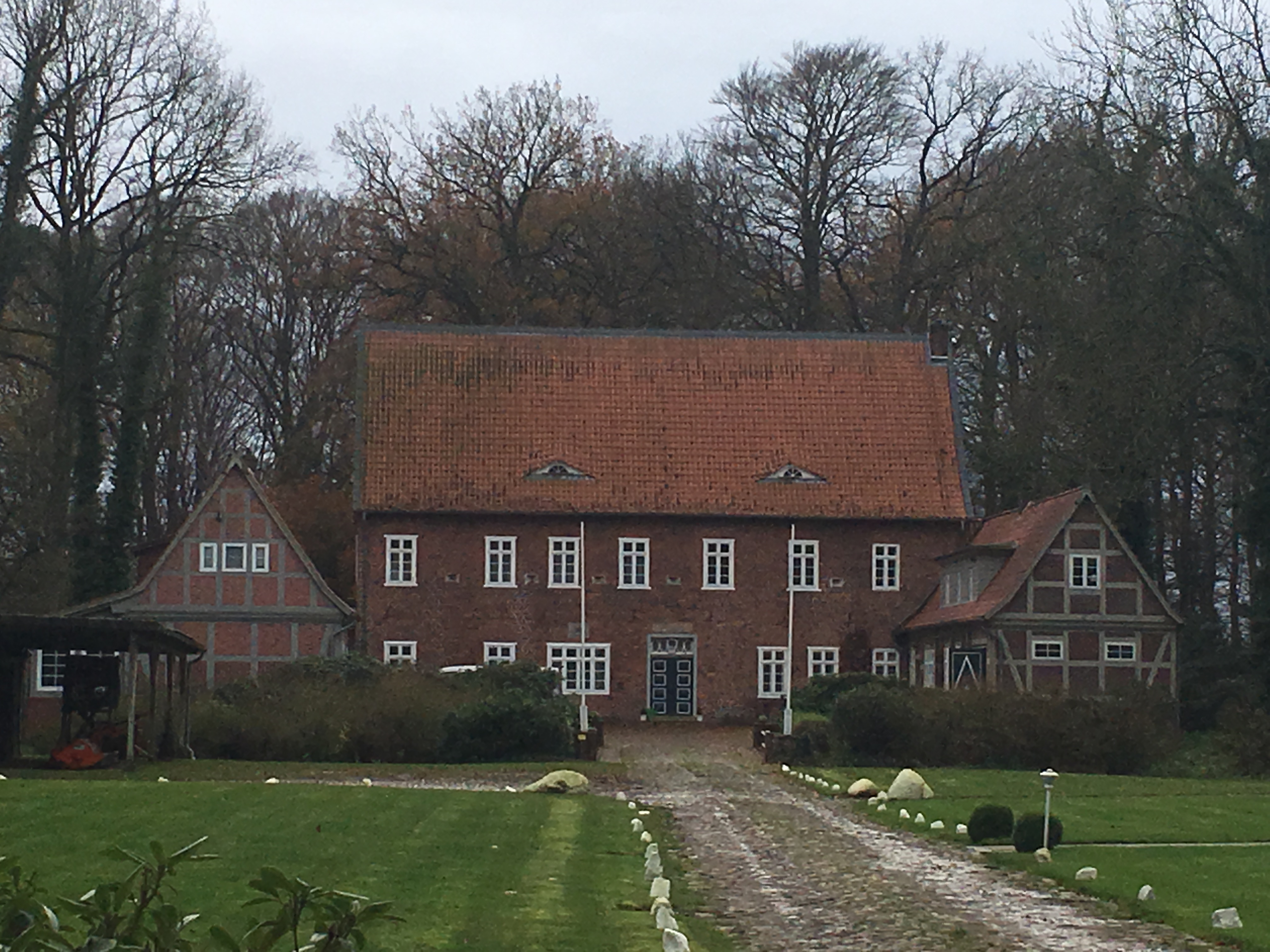 Good Poggmöhlen